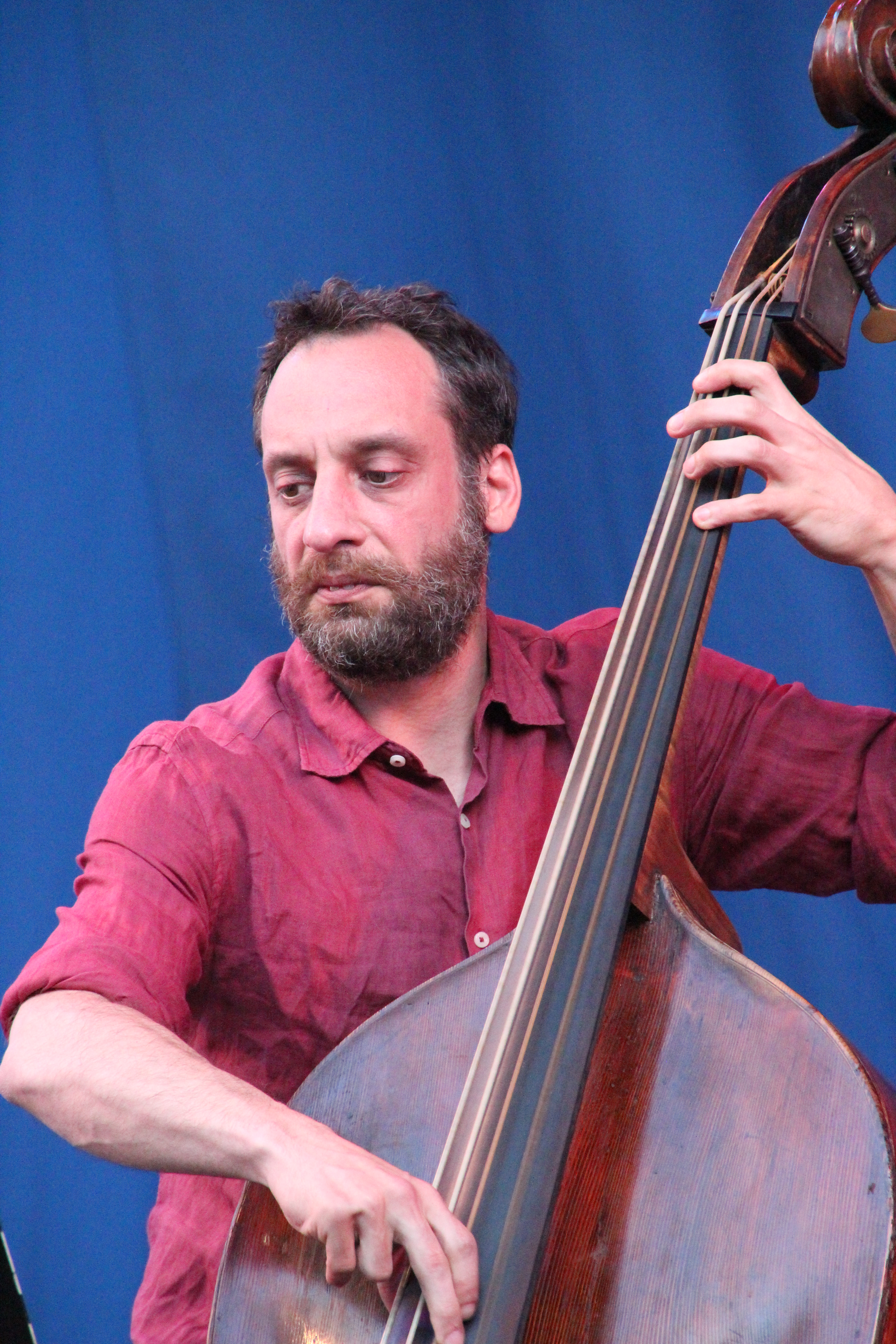 Bildinhalt: Antonio Borghini bei einem Auftritt der Gruppe Quartetto Trionfale im Frankfurter Palmengarten Aufnahmeort: Frankfurt am Main, Deutschland Die dargestellte Person wurde bei einem öffentlichen Auftritt fotografiert.